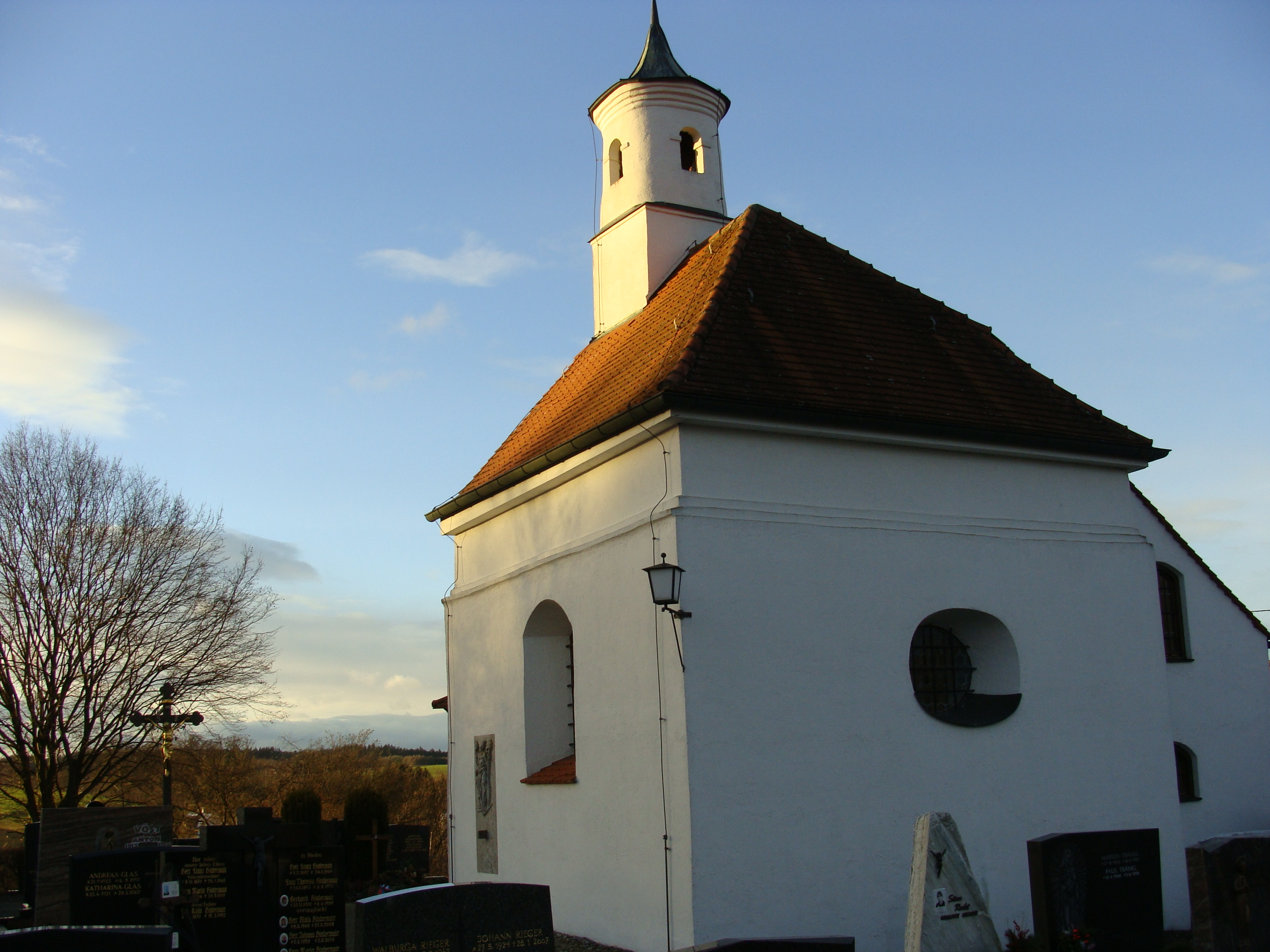 Ehemaliger Chor der Katholischen Pfarrkirche St. Georg